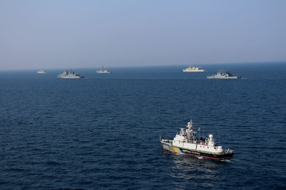 Фото: Павло Парфенюк